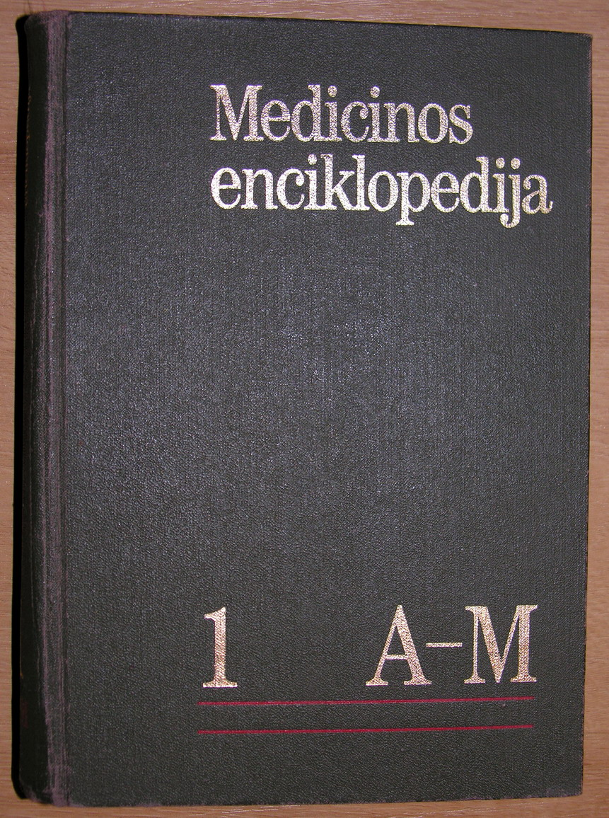 Medicinos enciklopedija. Vilnius, 1991-1993, 1-2 t. Fotografavo: Algirdas, 2006 m. gegužės 3 d.